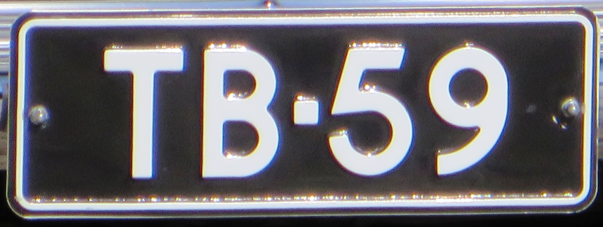 Kentekenplaat Finland oud